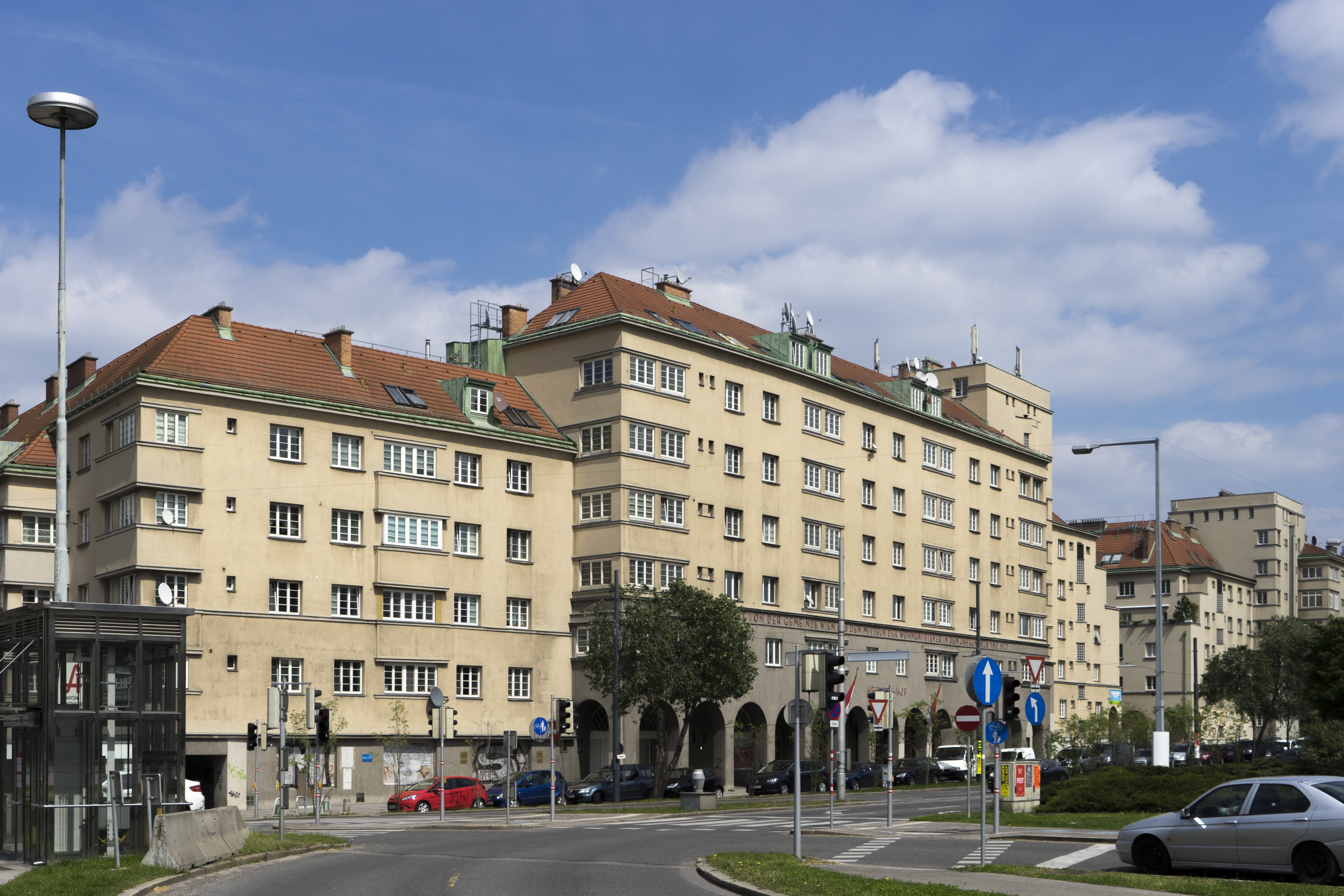 Der Herweghhof ist ein Gemeindebau der Zwischenkriegszeit in Wien am Gürtel, dem "Ring des Proletariats". This media shows the Vienna residential building (Gemeindebau) with the ID 98. Object location48° 10′ 51.33″ N, 16° 21′ 01.56″ E